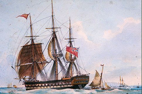 Navío Cumberland, antes llamado Thames, rebautizado en Chile con el nombre de San Martín.